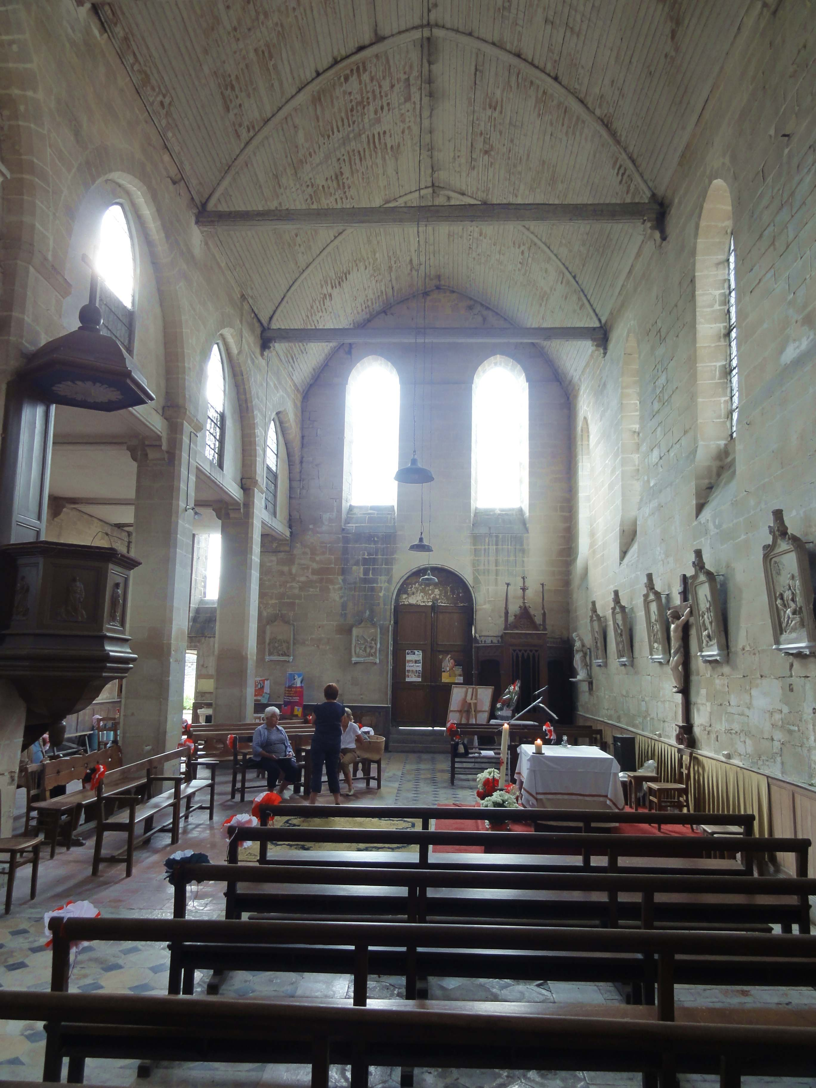 Intérieur de l'église (voir titre).